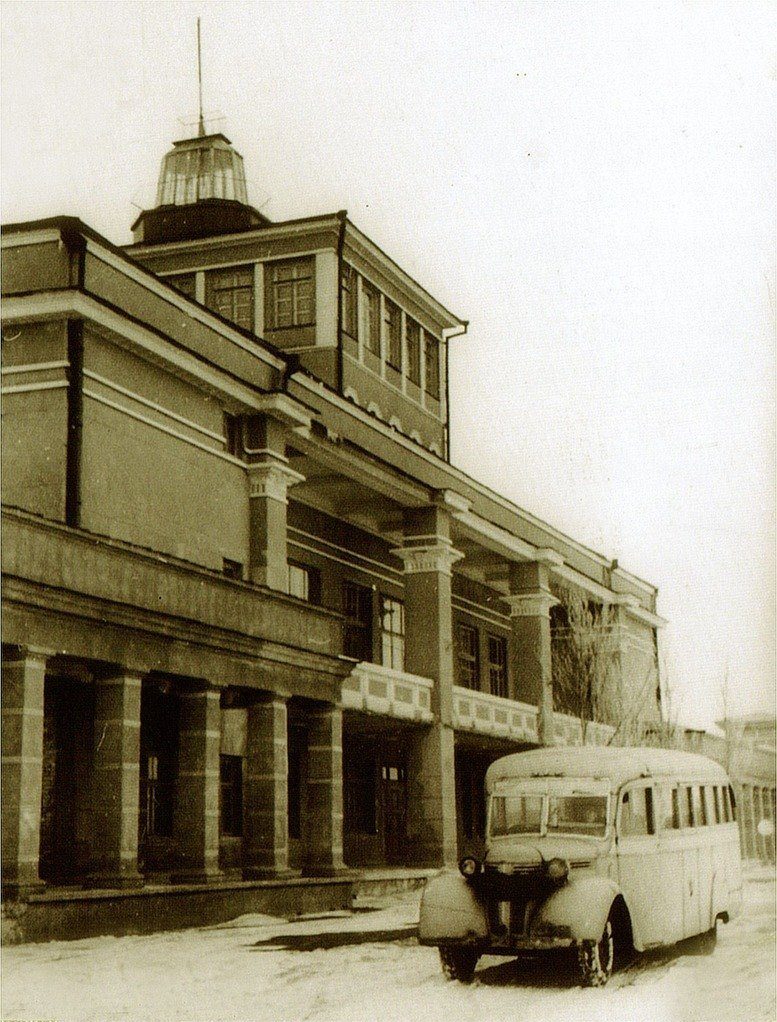 Здание аэровокзала аэропорта Ростова-на-Дону